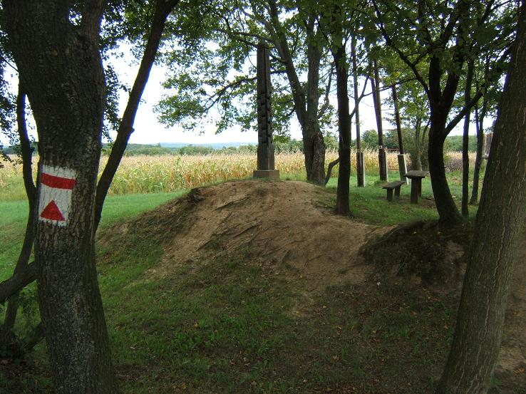 Somogy, Tolna és Baranya megyék hármashatára a legújabb megyehatárok szerint.